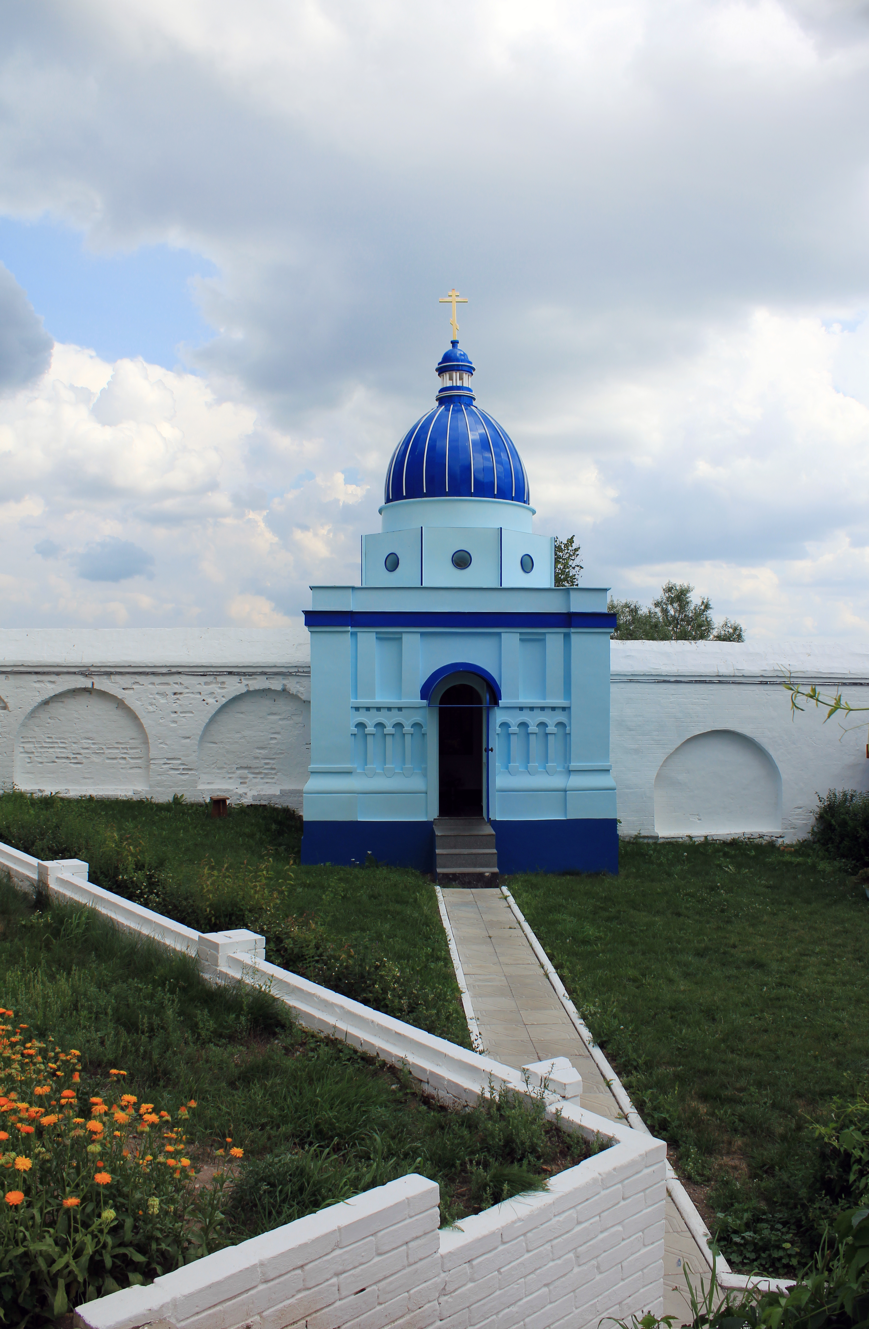 Ансамбль Боголюбовского монастыря (монастырь Боголюбский) (Владимирская область, Владимир, р. п. Боголюбово)